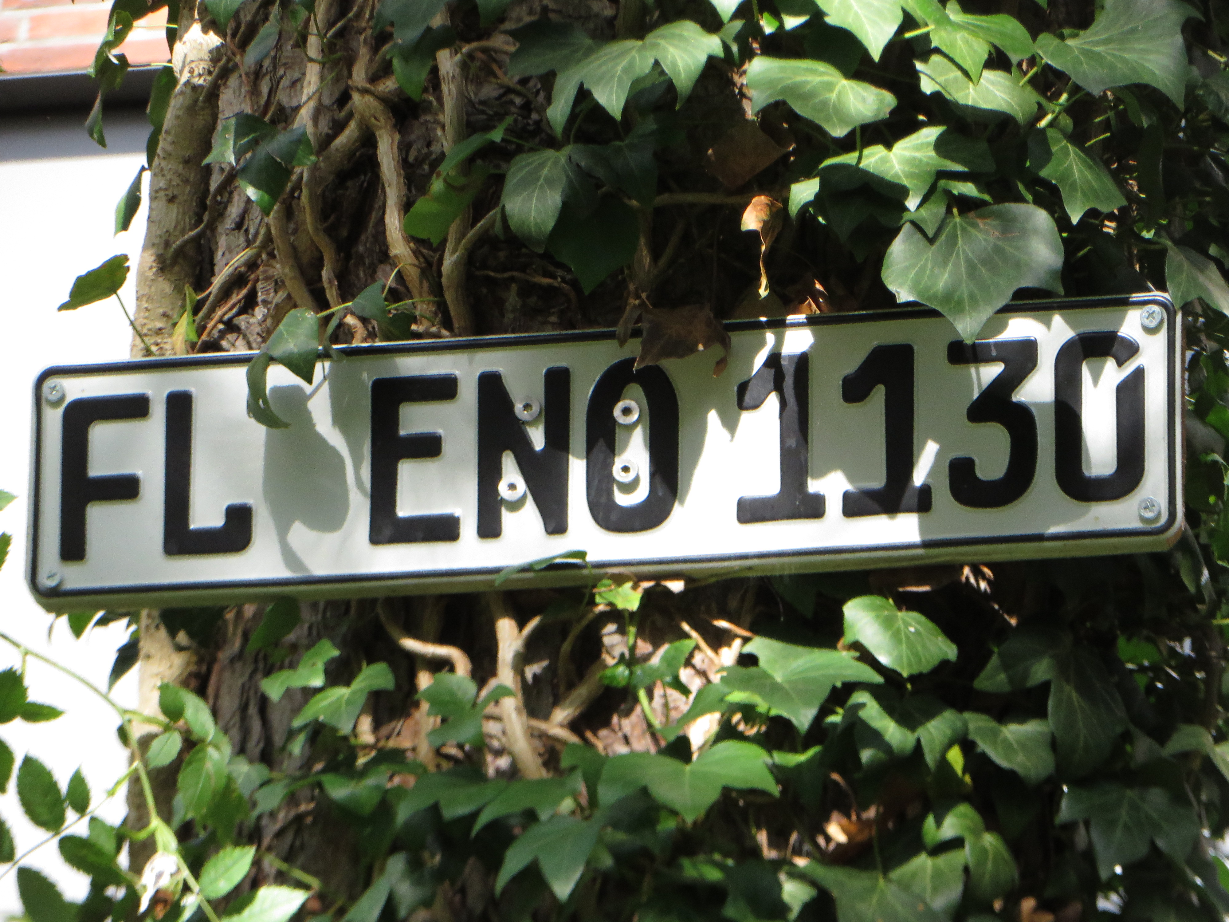 Autokennzeichenschild Fleno 1130, Bild 02